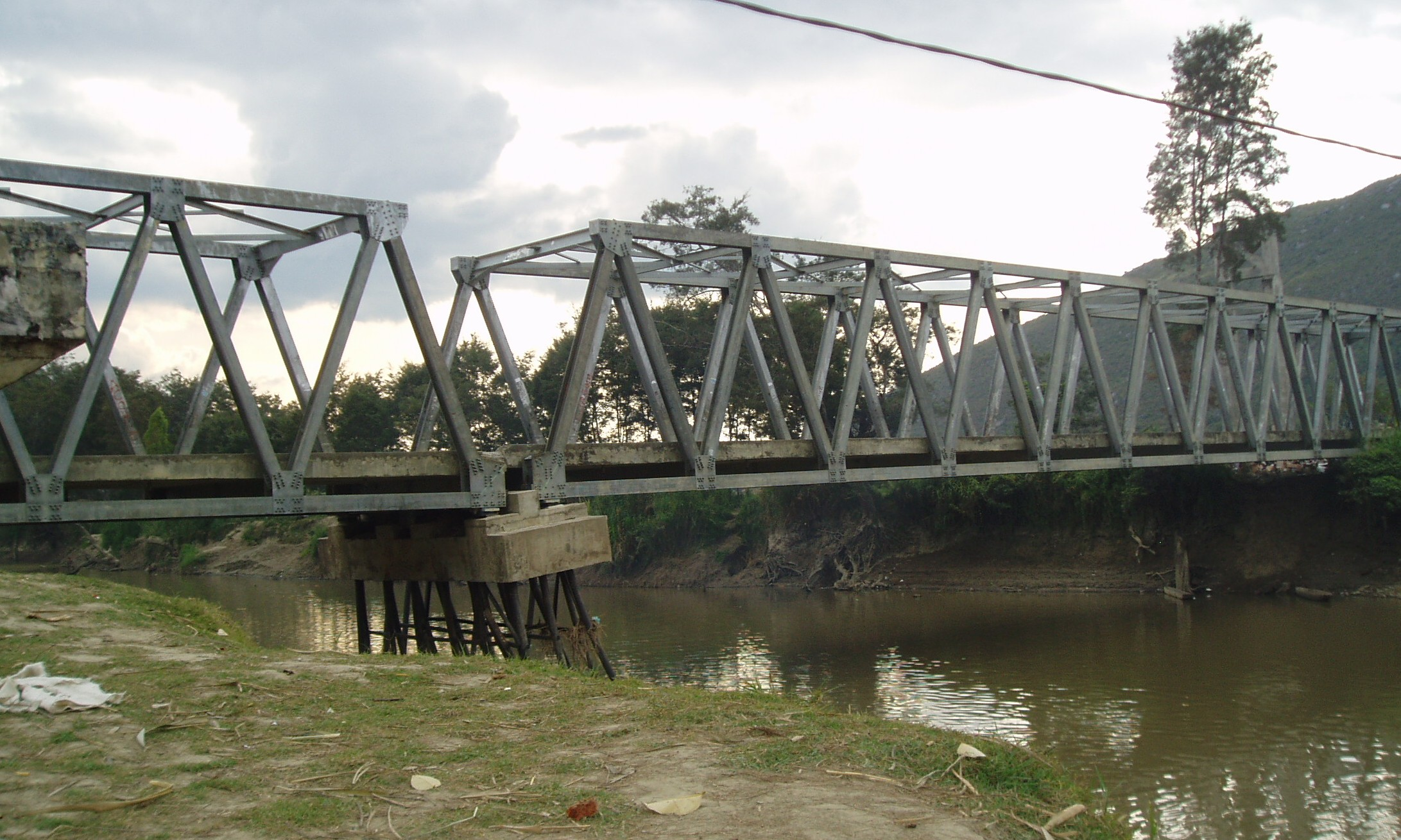 Brug over de Noordelijke Baliem nabij Wamena (Papoea, Indonesië) Bridge over the Northern Baliem River near Wamena, Papua, Indonesia